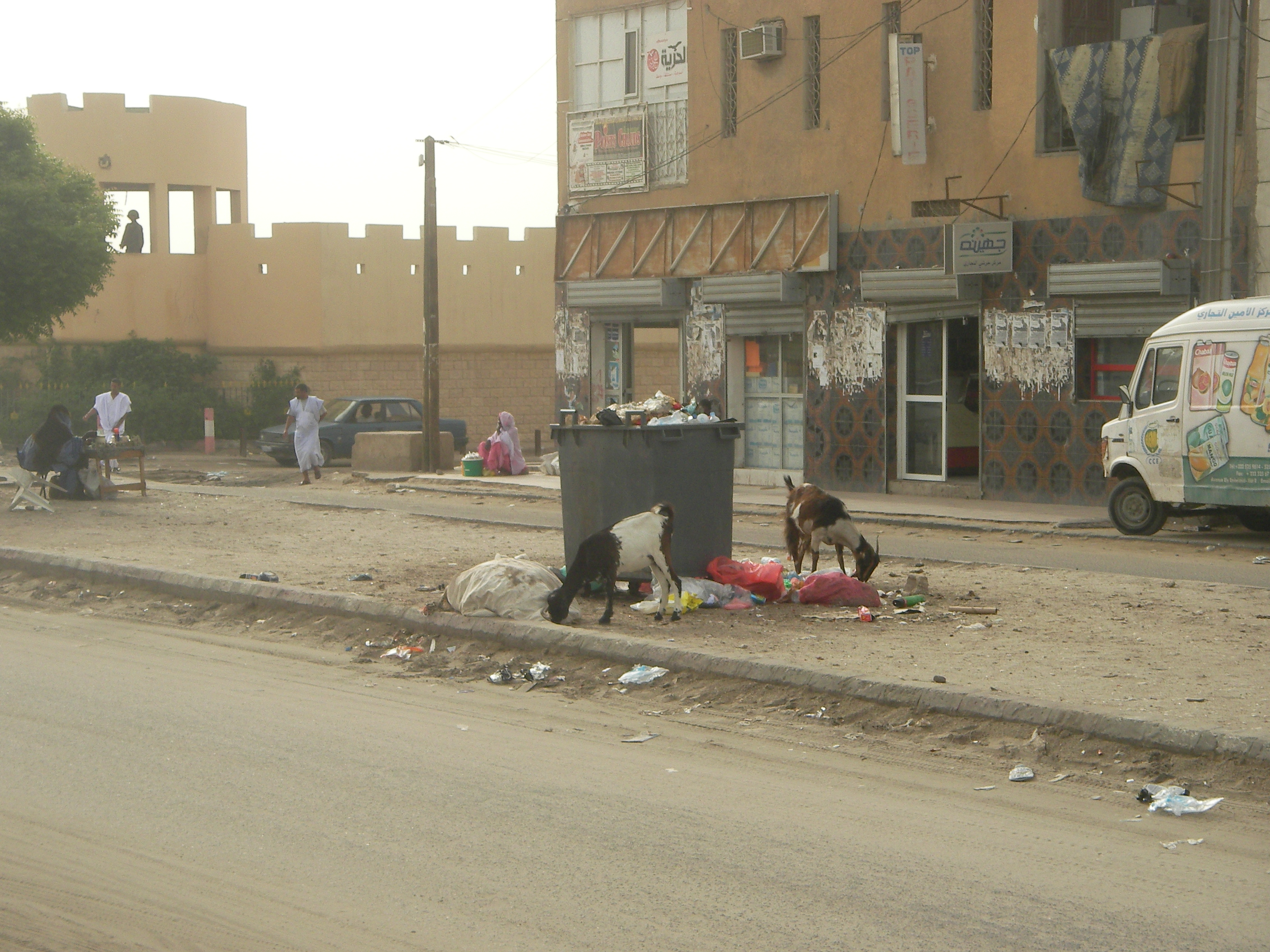 Nouakchott street scene